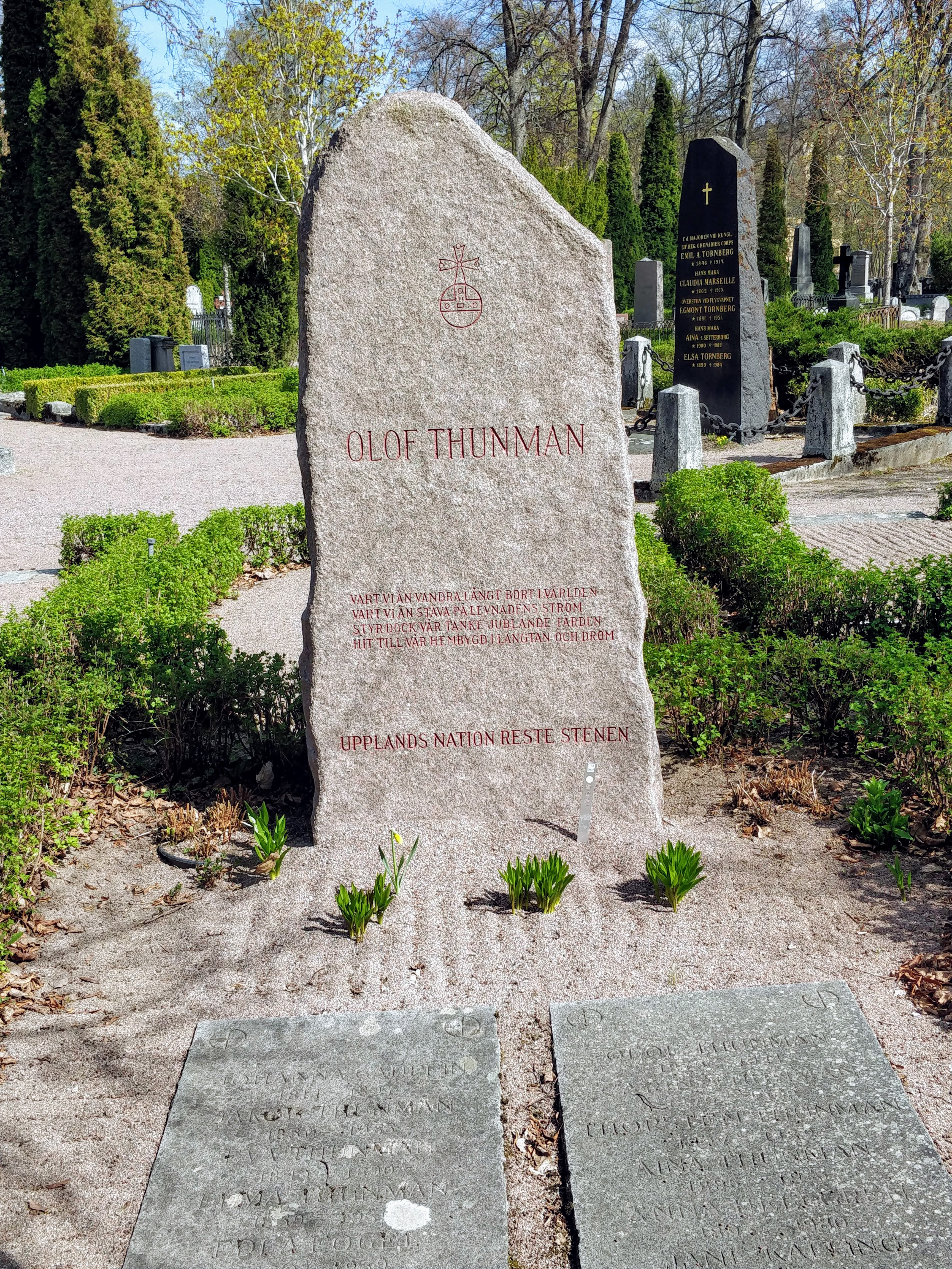 Gravvård Olof Thunman, Uppsala gamla kyrkogård. Gravplats 0115-0801.